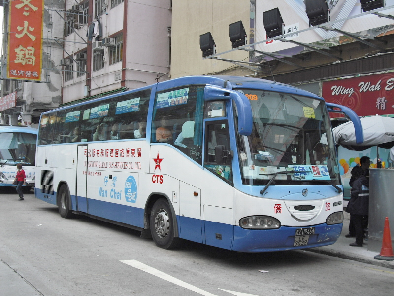 皇崗過境巴士油尖線的2003年Scania巴士，攝於旺角彌敦道近鴉蘭街街口